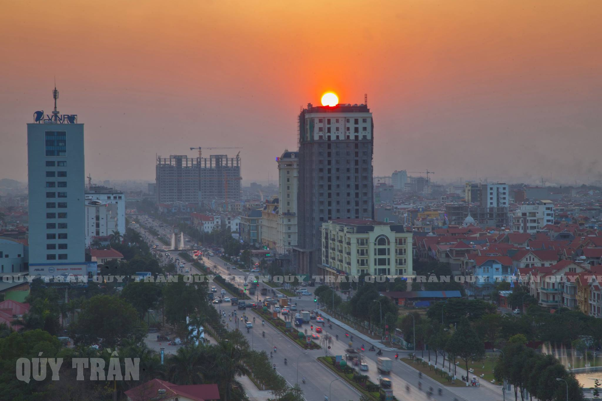 Thành Phố Bắc Ninh